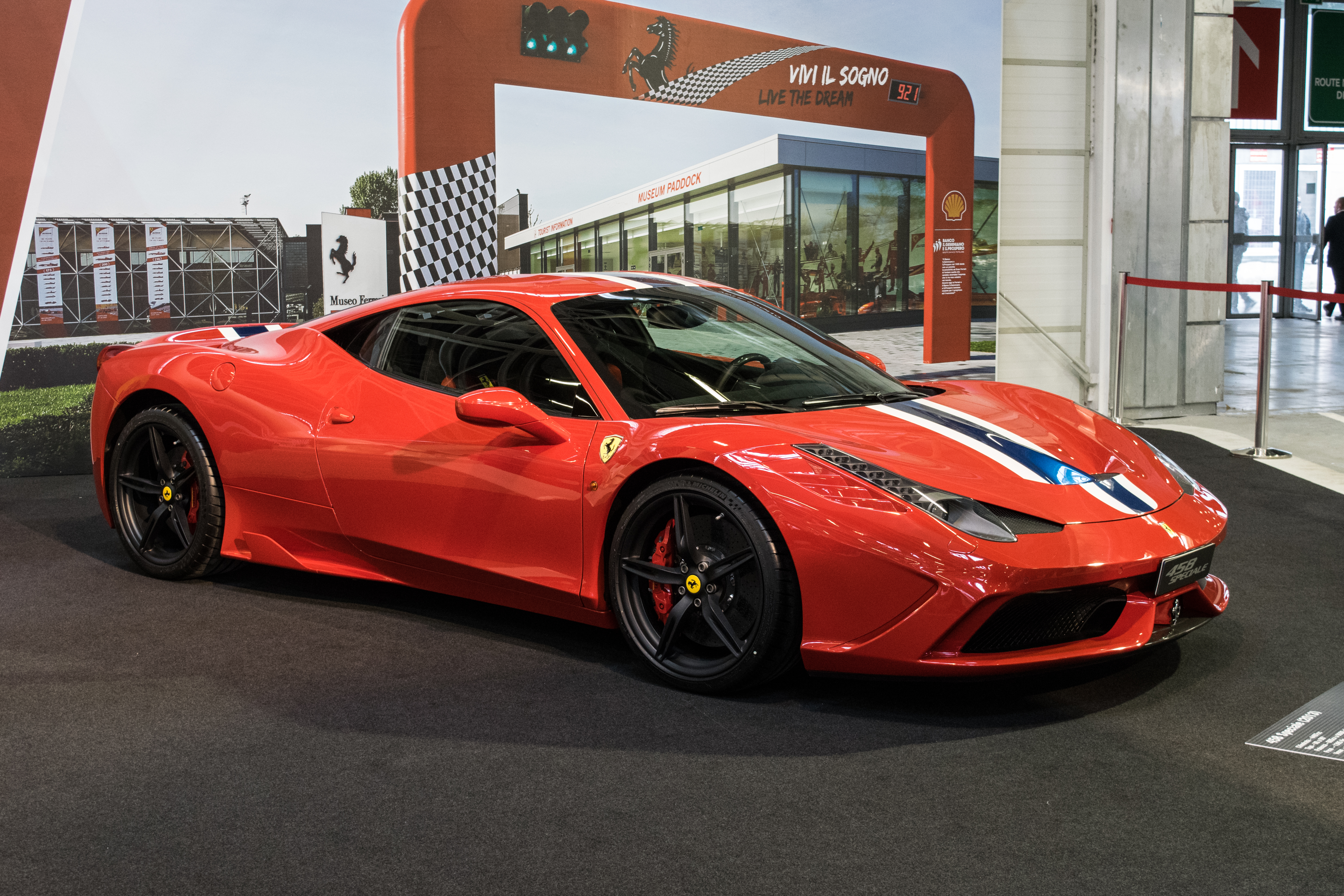 Ferrari 458 Speciale